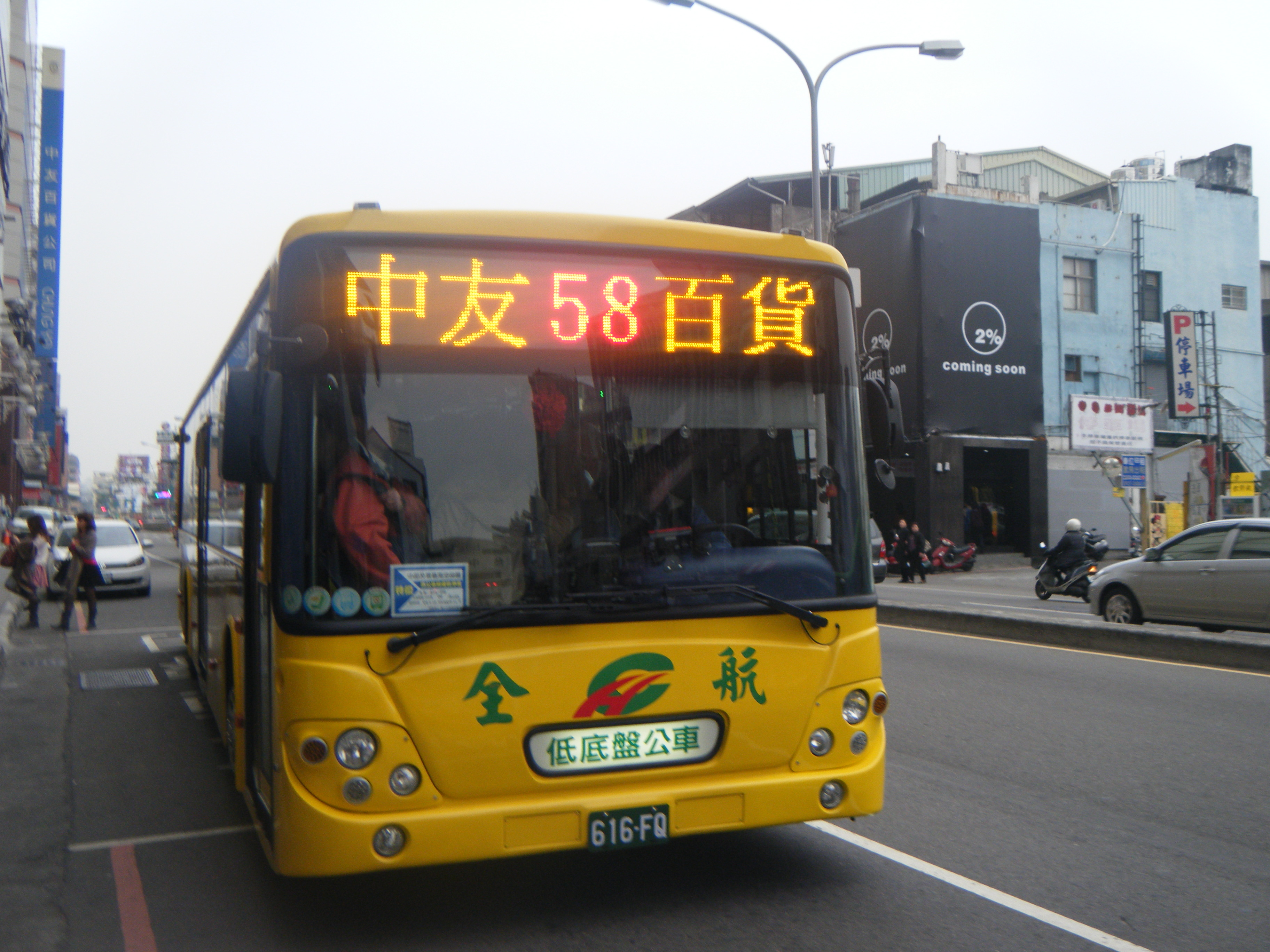 全航客運大客車616-FQ車頭